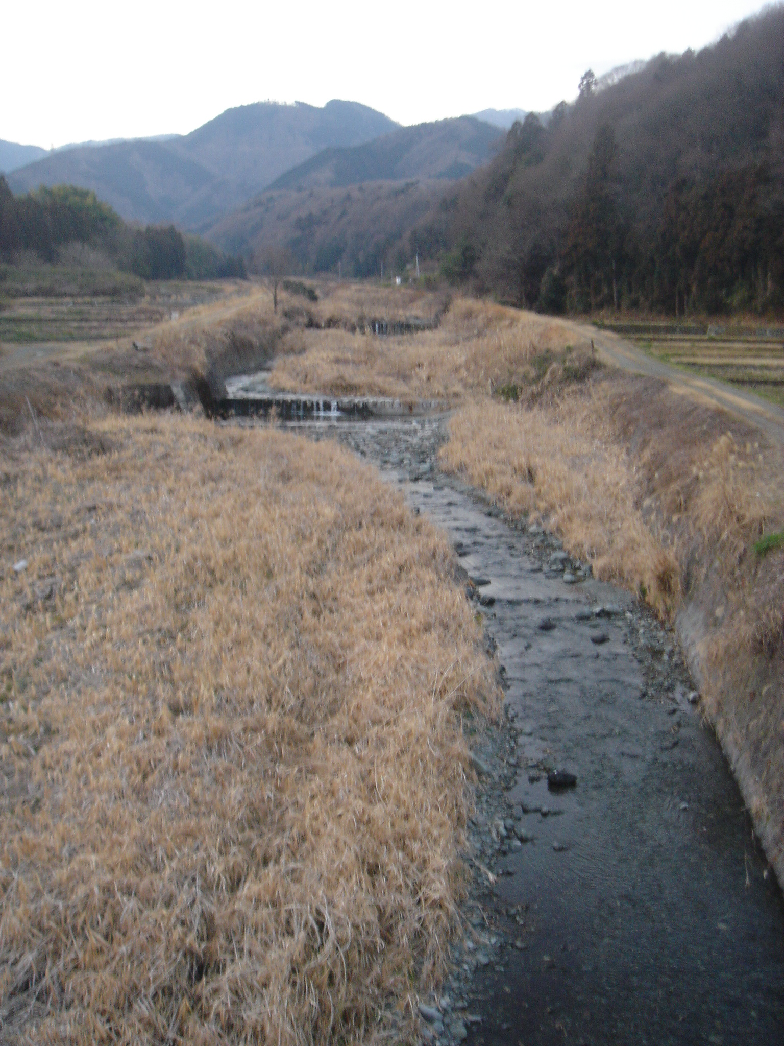 from Saido Bridge